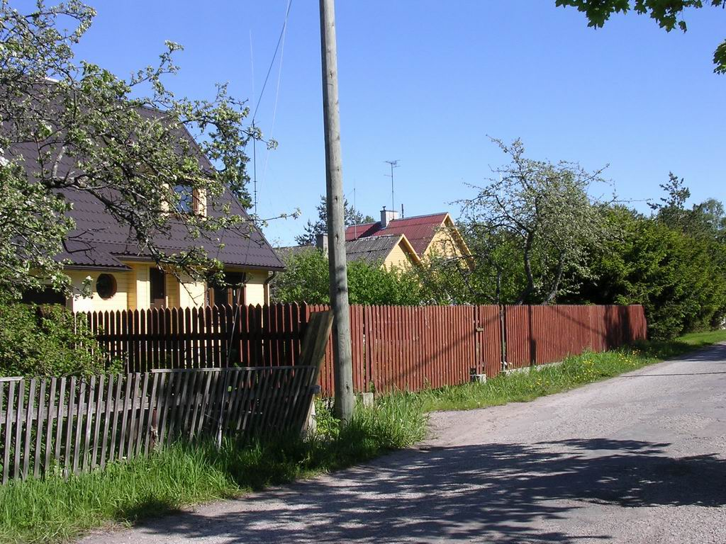 Põõsa tee